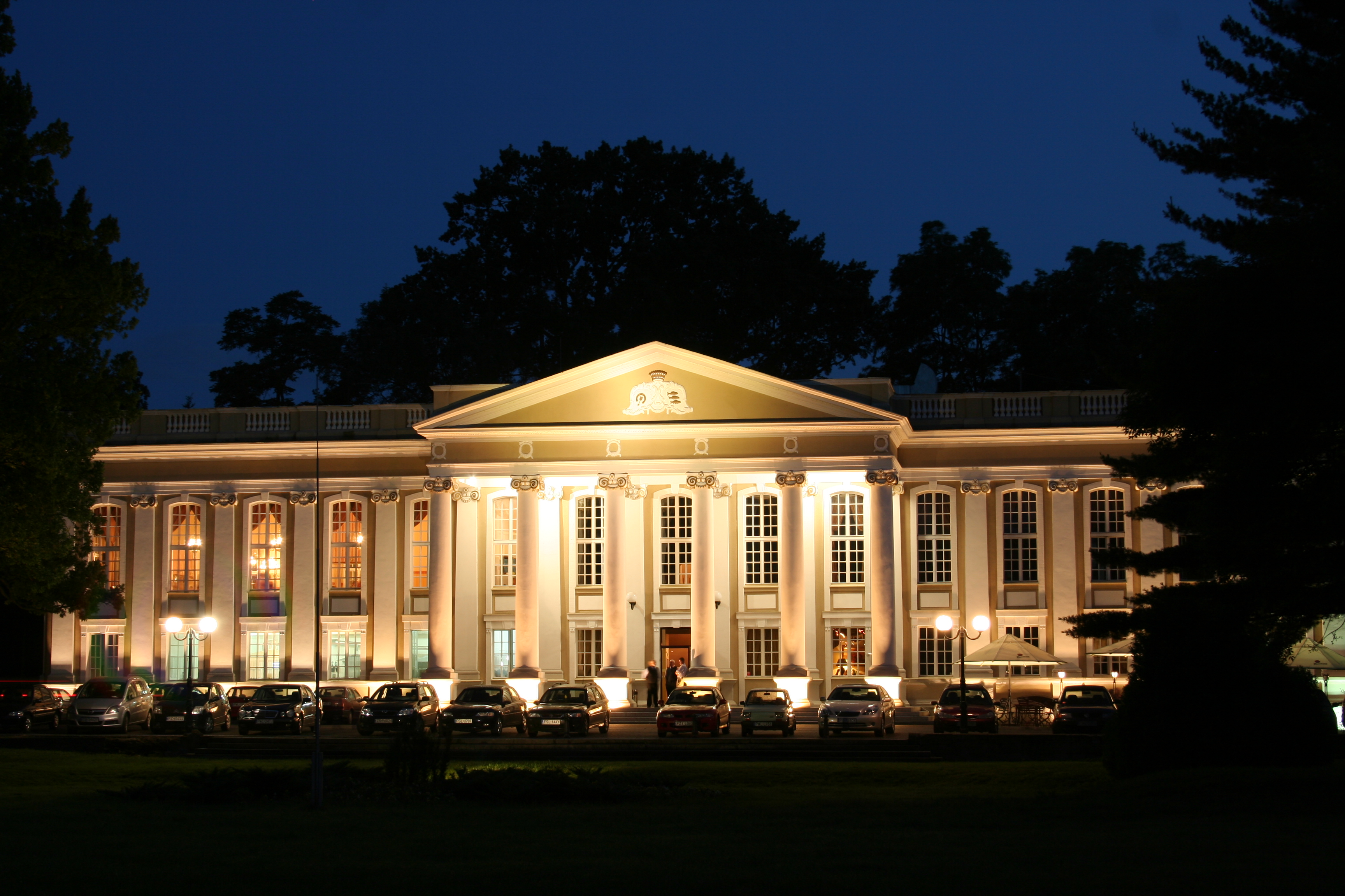 Hôtel "Wolsztyn" dans le parc